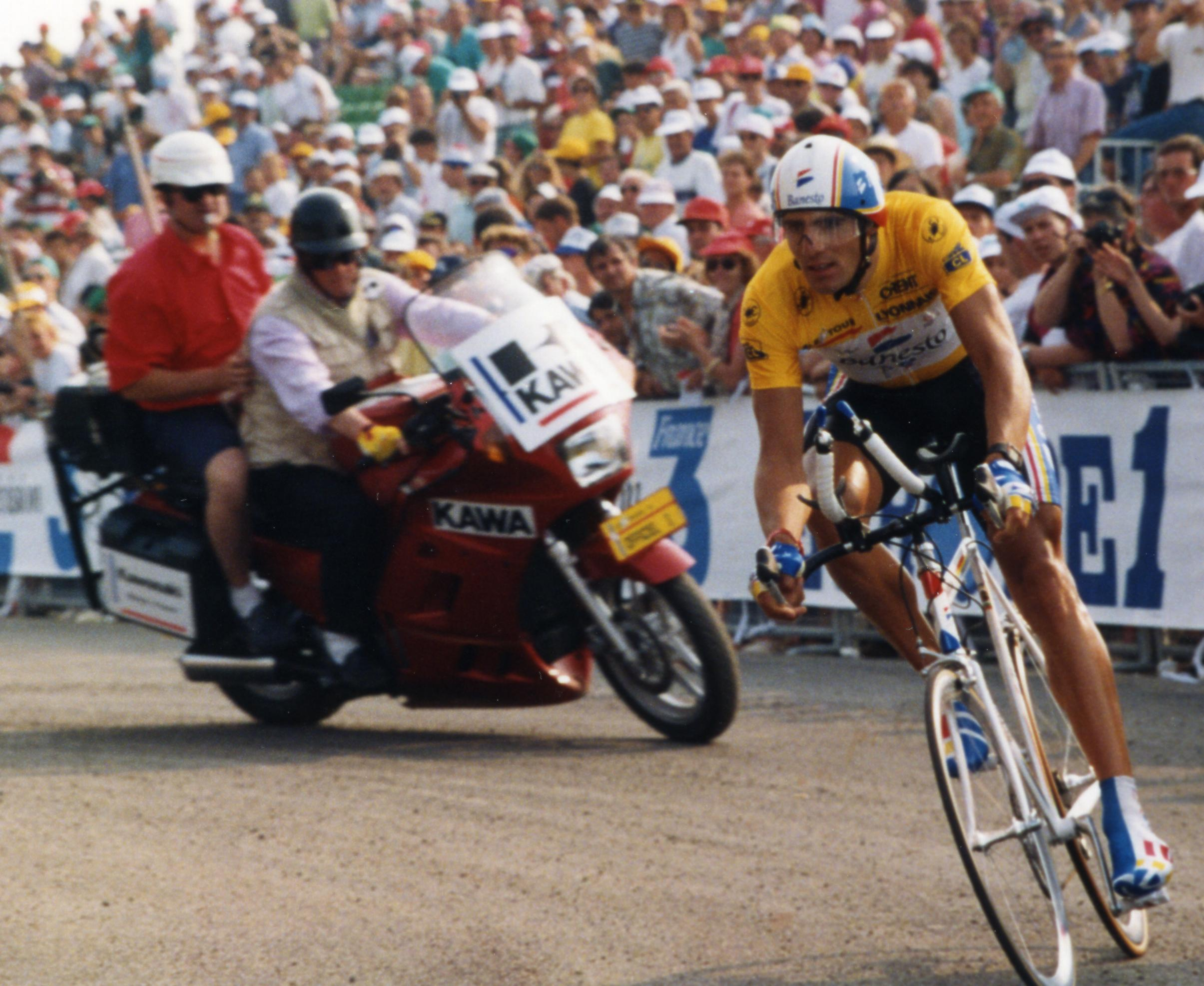 TOUR DE FRANCE 1993